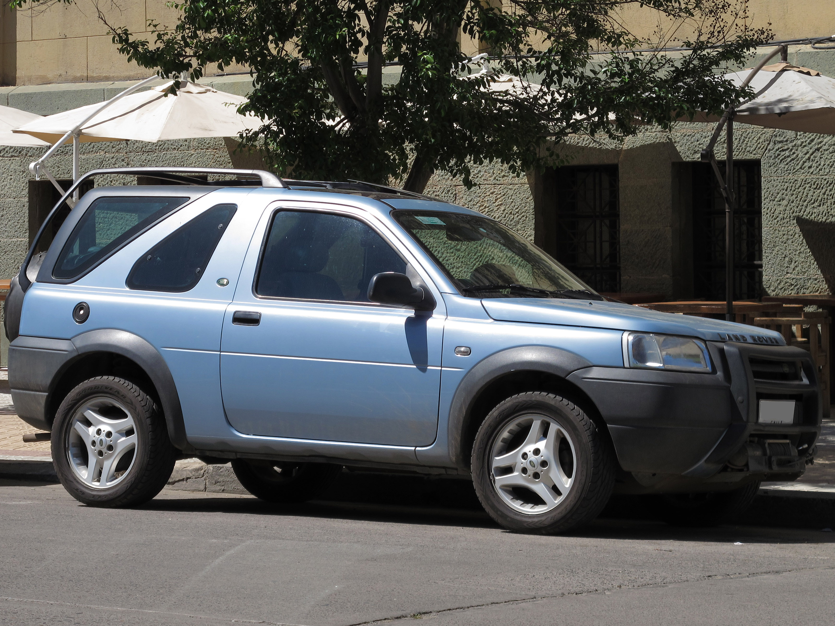 Land Rover Freelander 1.8 XEi 2004